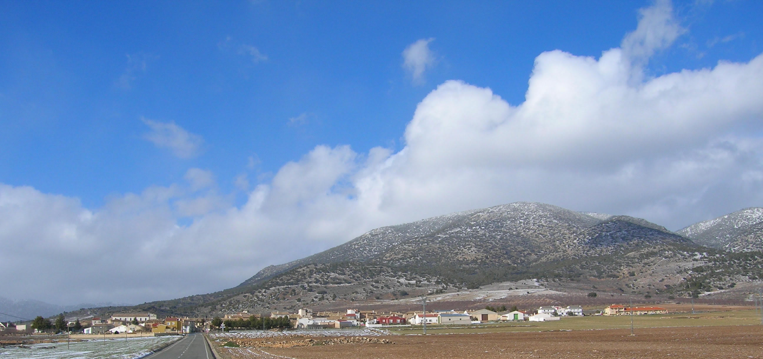 Pedanía de Cañada de la Cruz, del municipio de Moratalla, en Murcia, España. Al fondo, el macizo de Revolcadores (2027 m). Fotografía propia, cedida al dp.